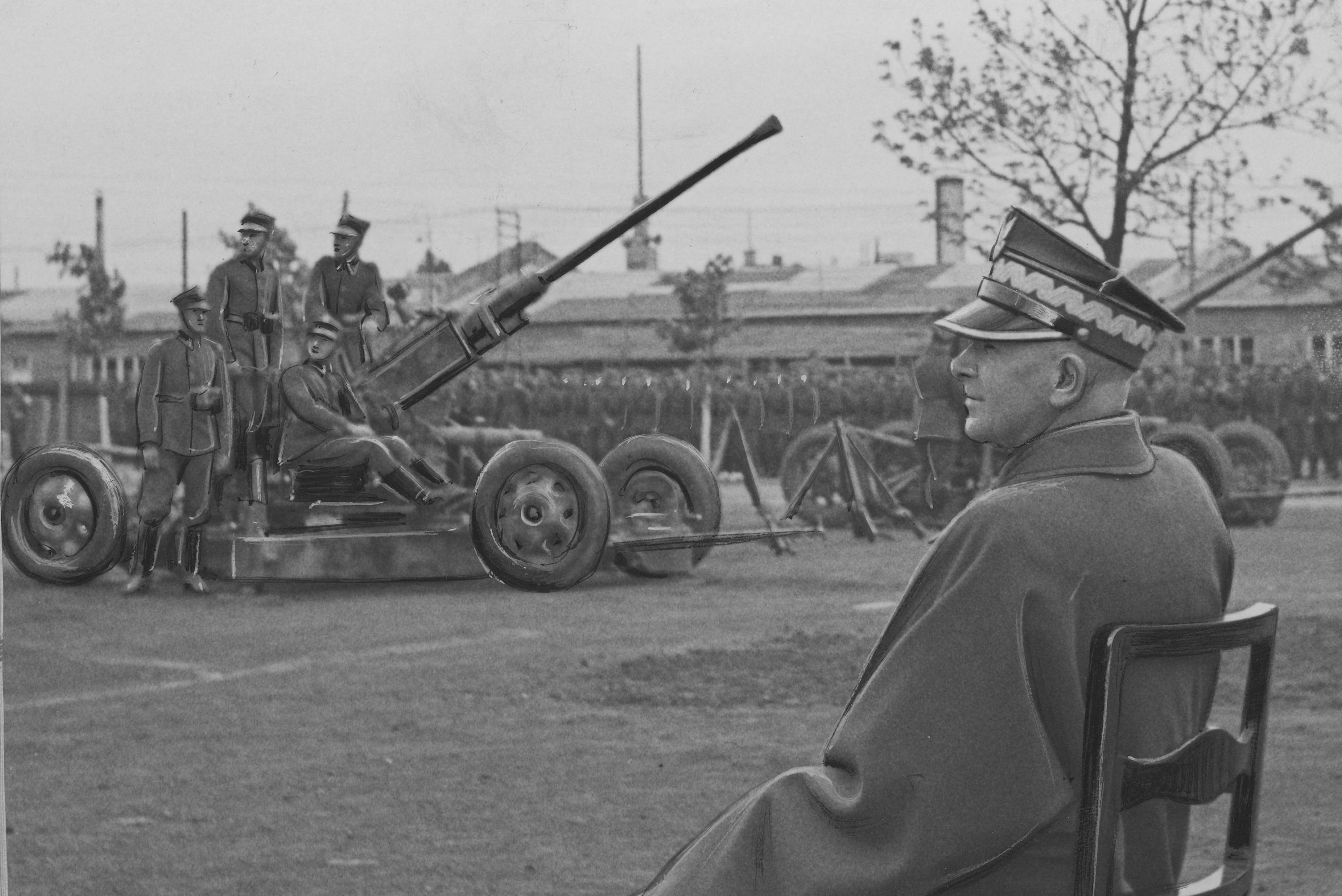 Przekazanie 1 pułkowi artylerii przeciwlotniczej armat przeciwlotniczych Bofors wz. 36, ufundowanych przez prawników polskich. Na pierwszym planie marszałek Edward Rydz-Śmigły. Koncern Ilustrowany Kurier Codzienny - Archiwum Ilustracji. Sygnatura: 1-W-3078